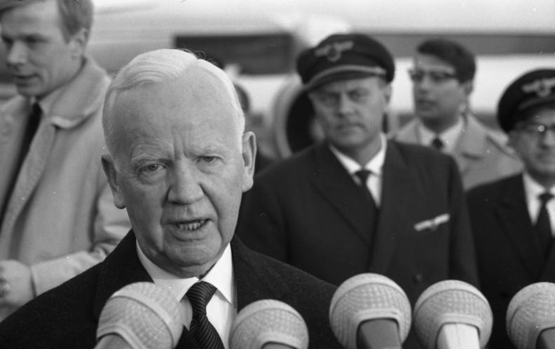 Abflug des Bundespräsidenten zum Staatsbesuch nach Afrika Flughafen Köln-Wahn